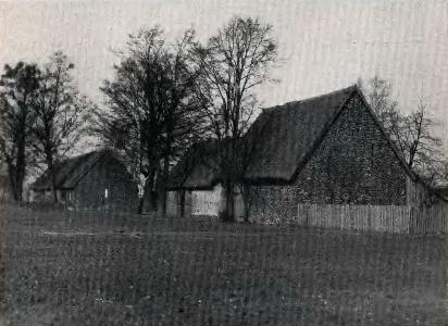 Kościeliska